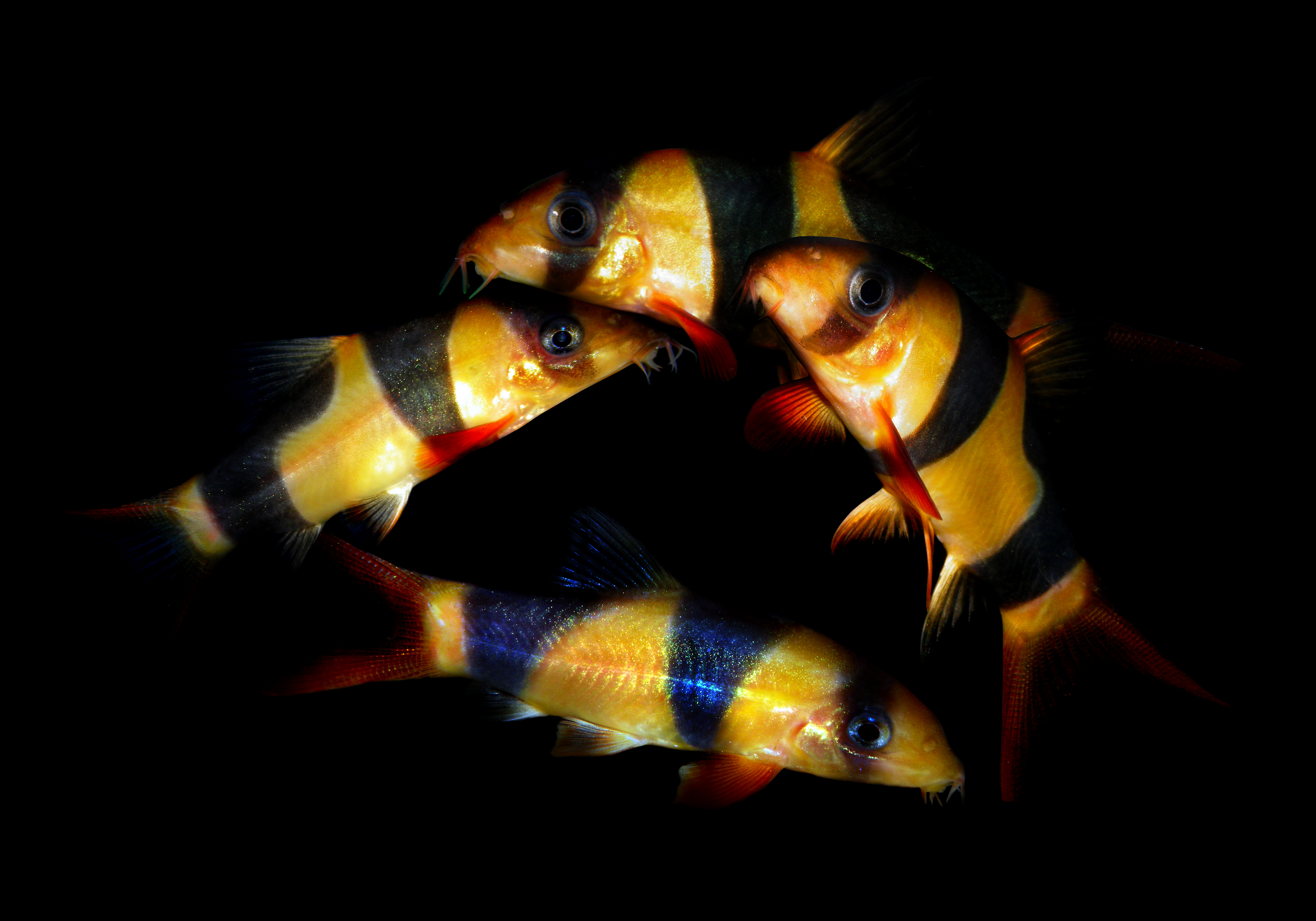 Chromobotia macracanthus (Bleeker, 1852) Clown loach